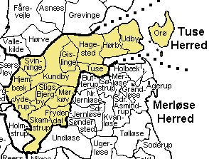 Tuse Herred Holbæk Amt , Denmark. Map by Svend-Erik Christiansen, edited by user:Nico-dk .